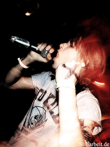 Eva Genie, Sängerin der Vegan Straight Edge Band Gather (Ausschnitt)